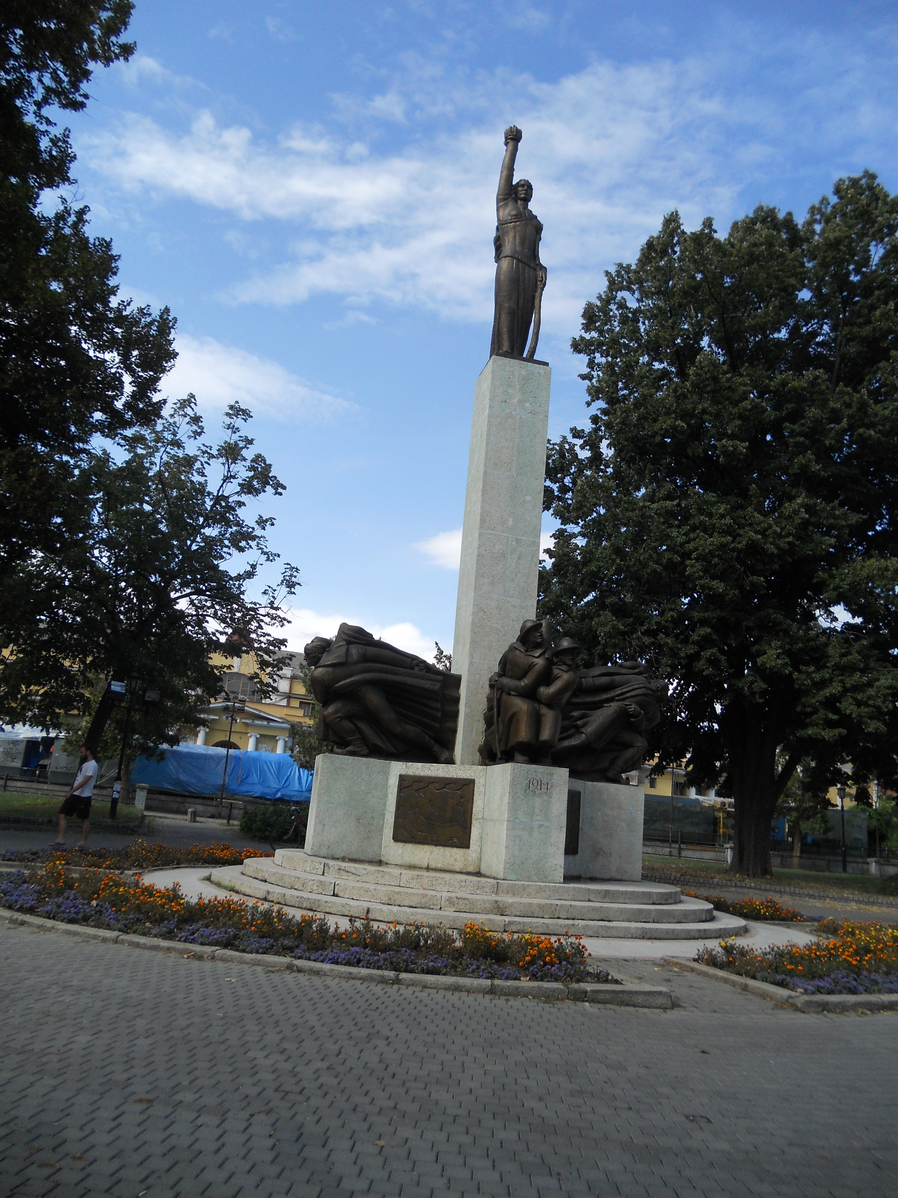 Spomenik palim Šumadincima